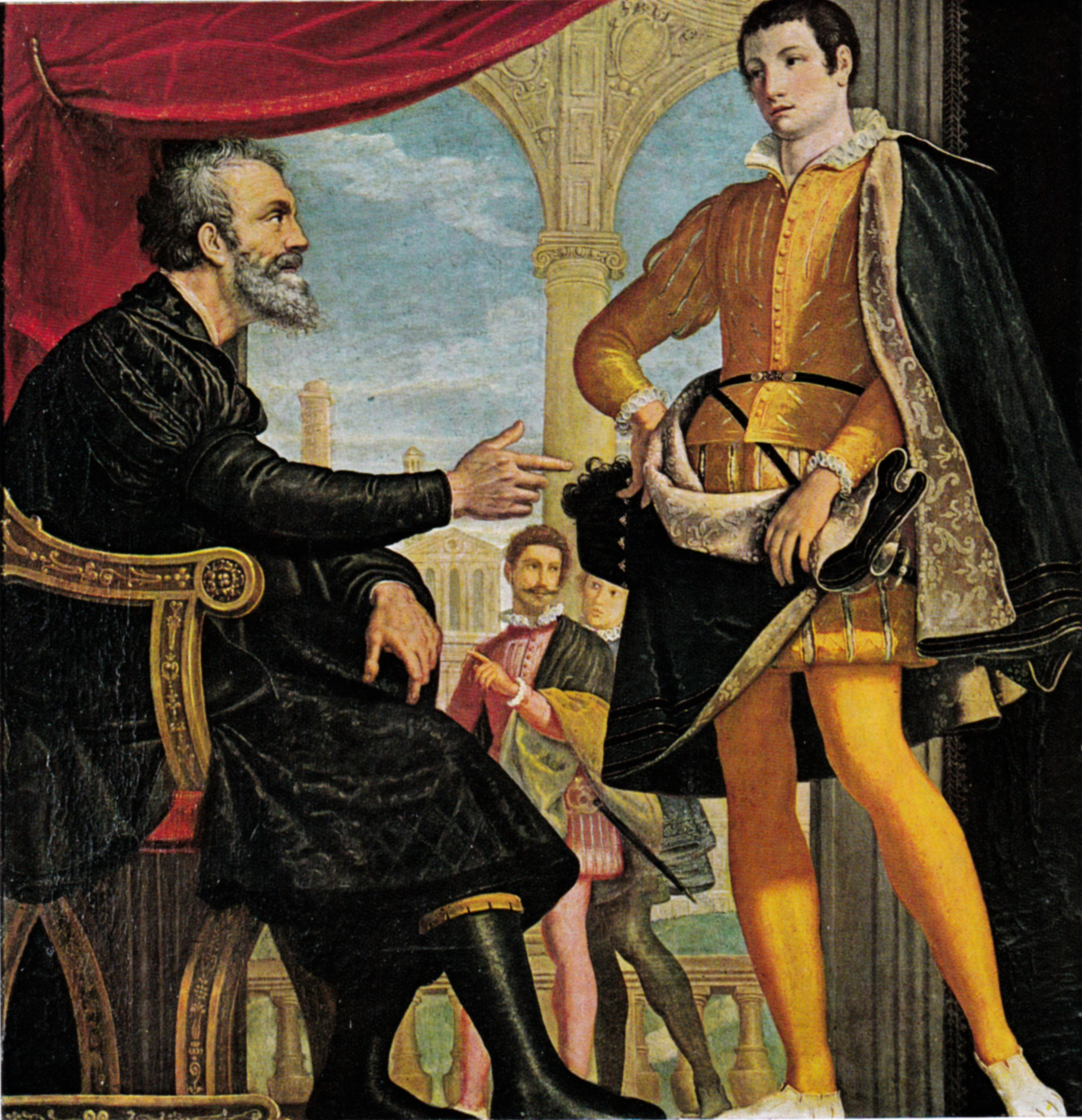 Cosimo gamberucci, michelangelo e francesco I de medici.jpg